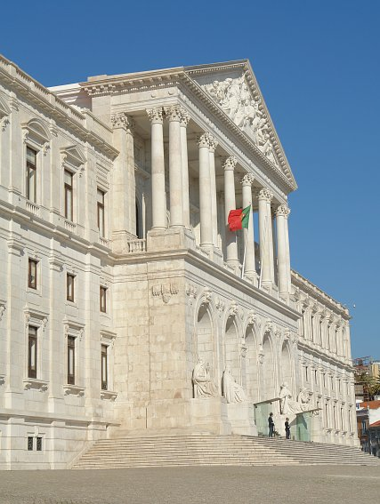 Photographer: Osvaldo Gago.